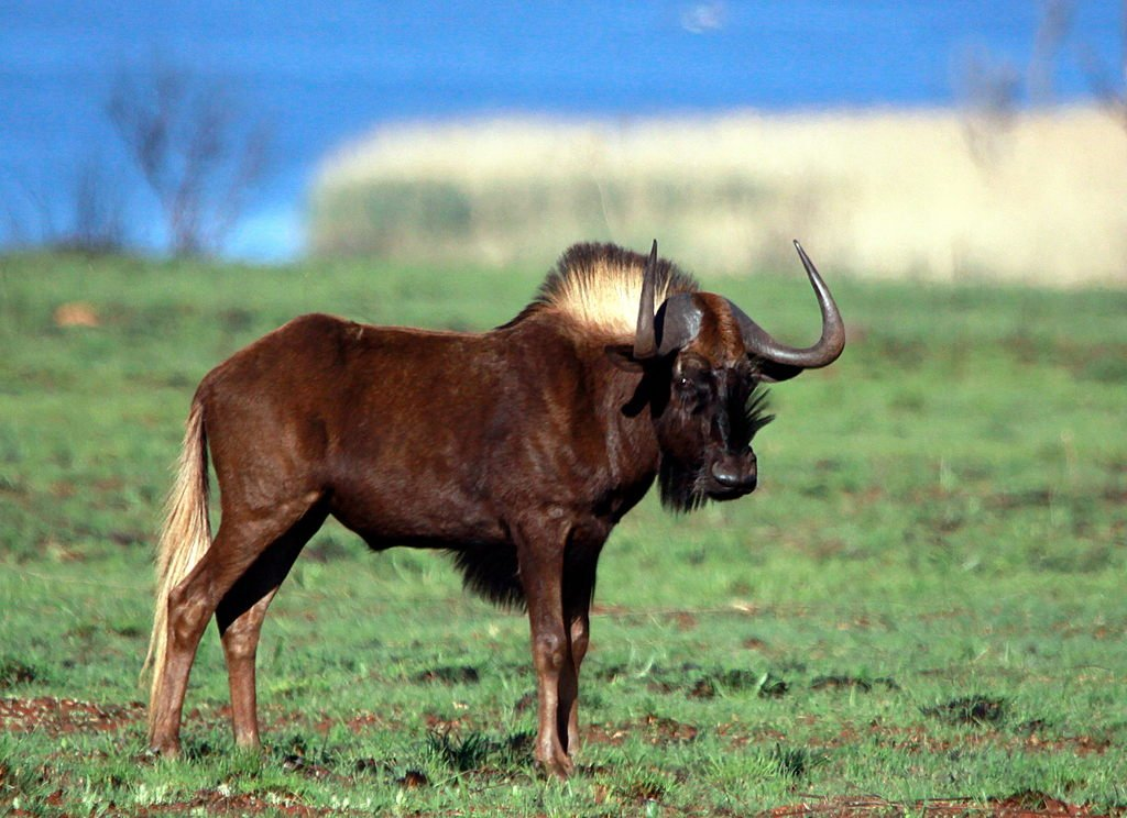 Wildebeeste